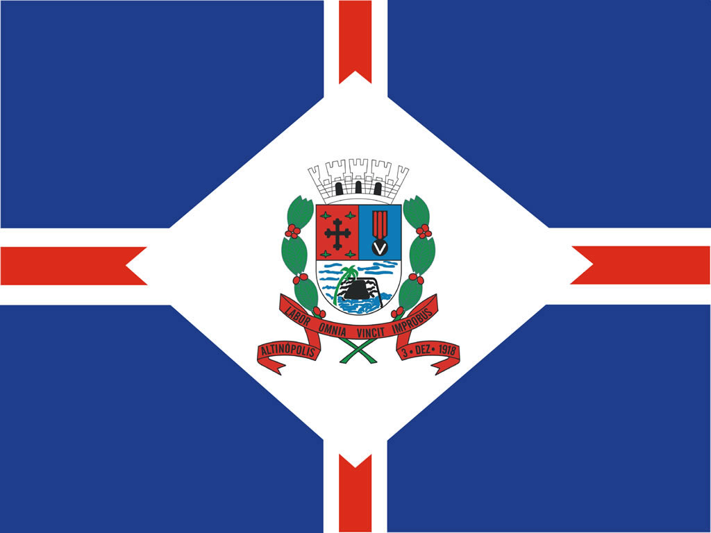 Municipa Flago de Altinópolis, en San-Pauxlio, Brazilo.